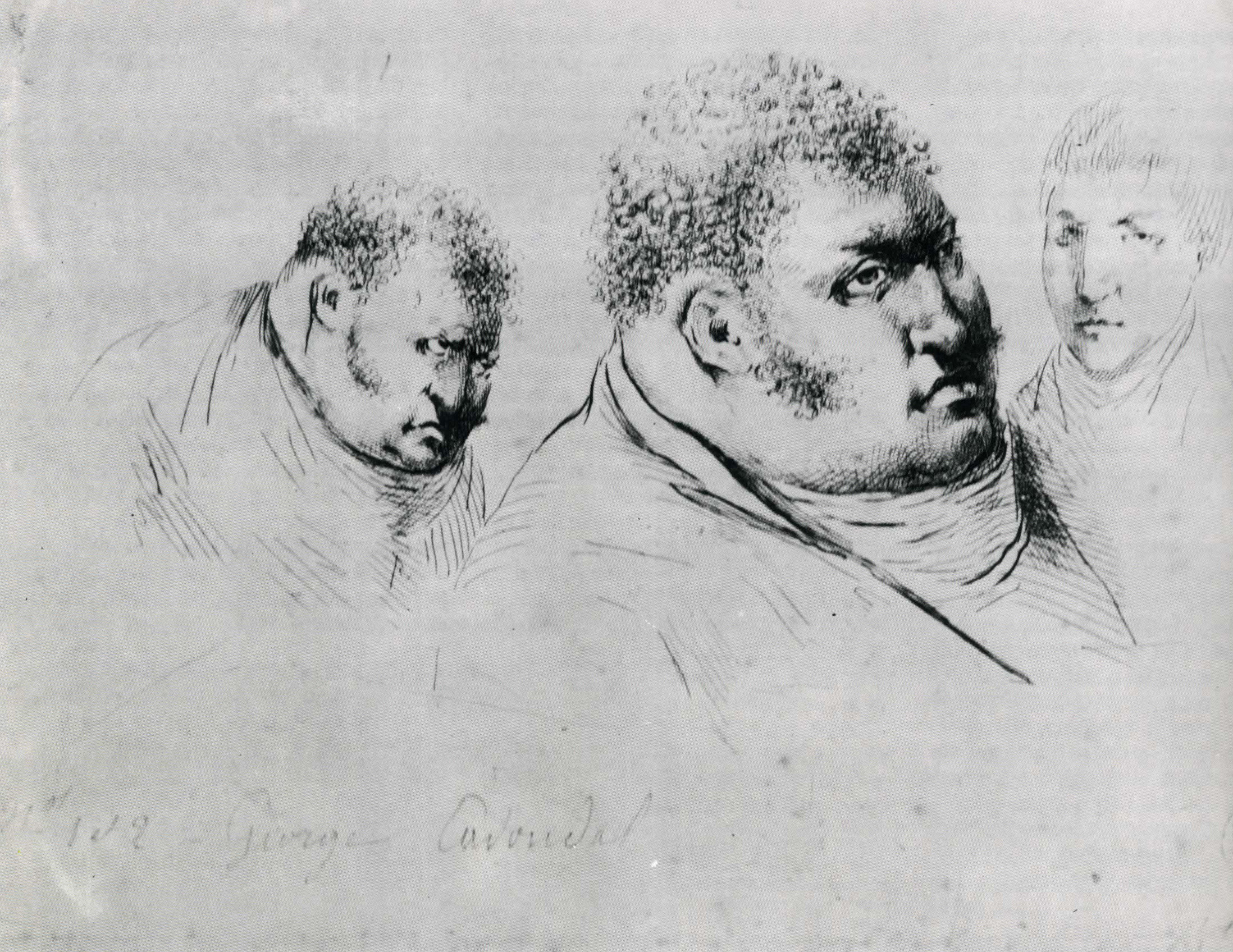 Georges Cadoudal, lors de son procès.